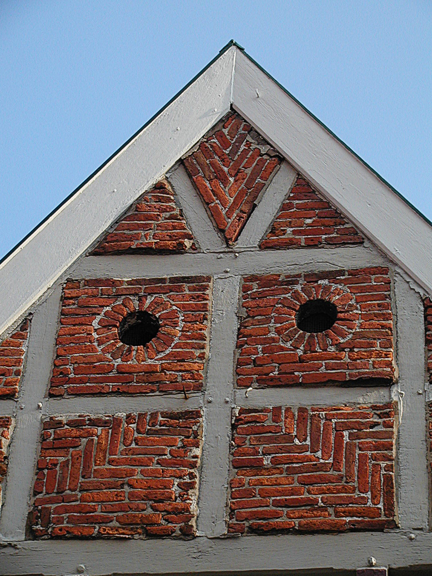 Zwei Eulenlöcher in einem alten Haus